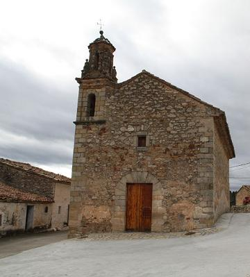 Ermita de Santa Bàrbara de Sucaina (Alt Millars, Castelló)